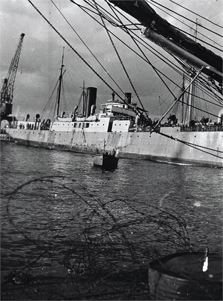 אונית המעפילים "תאודור הרצל" כחוף המולדת.